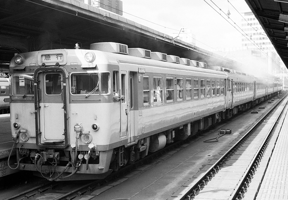 国鉄キハ65 急行みささ みまさか